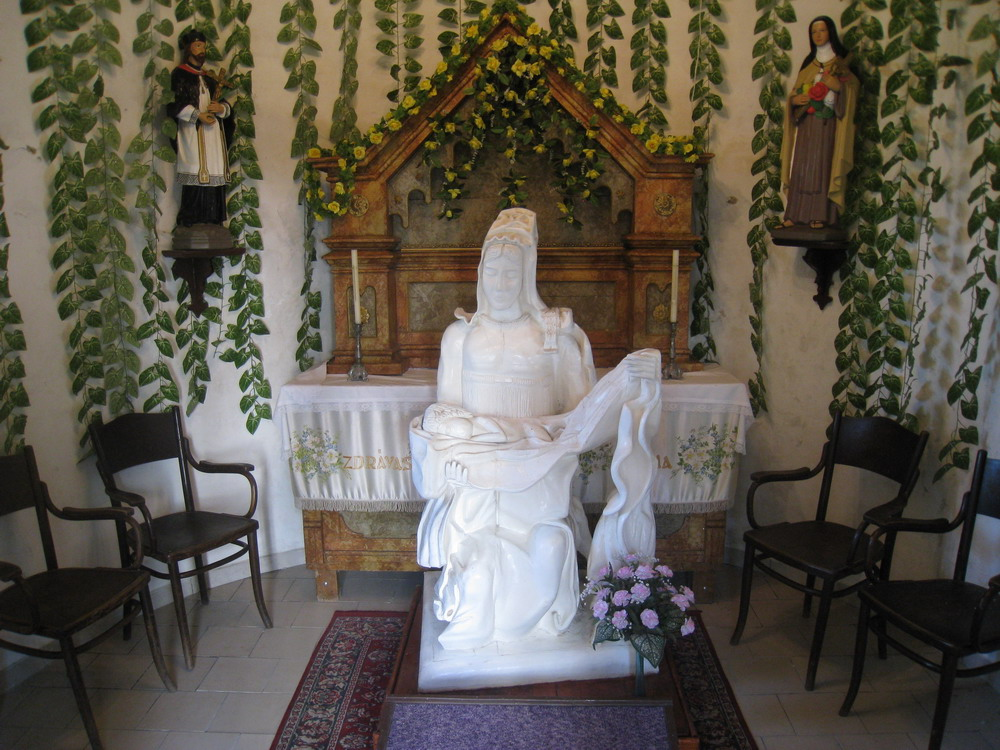 Interieur die Familiengruft in Oderberg